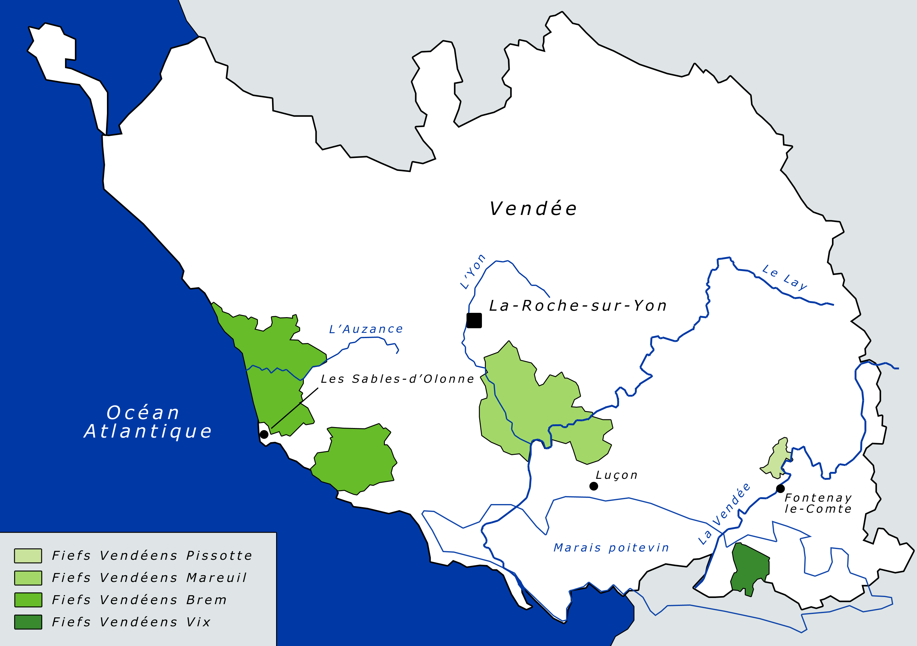 L'appellation d'origine fiefs-vendéens labellisée AO.VDQS